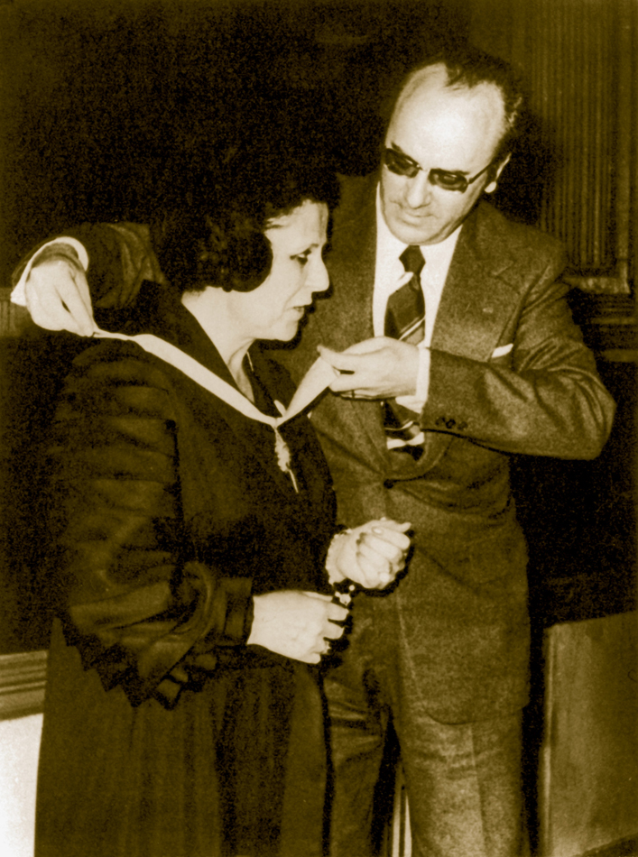 Ana García de Cuenca. Entrega de Cruz de Beneficencia.